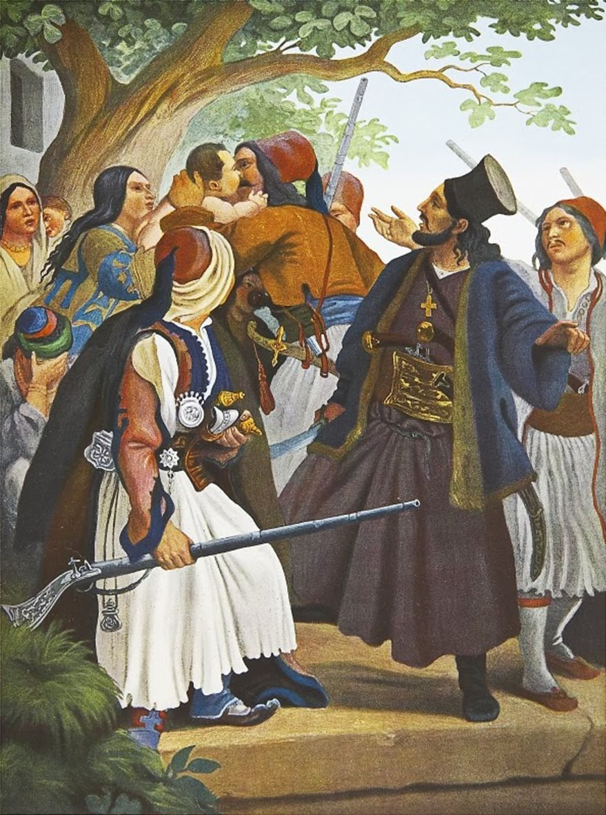 Αθανάσιος Διάκος, «ο Διάκος οδηγεί τους Δερβενοχωρίτας εις την μάχην»